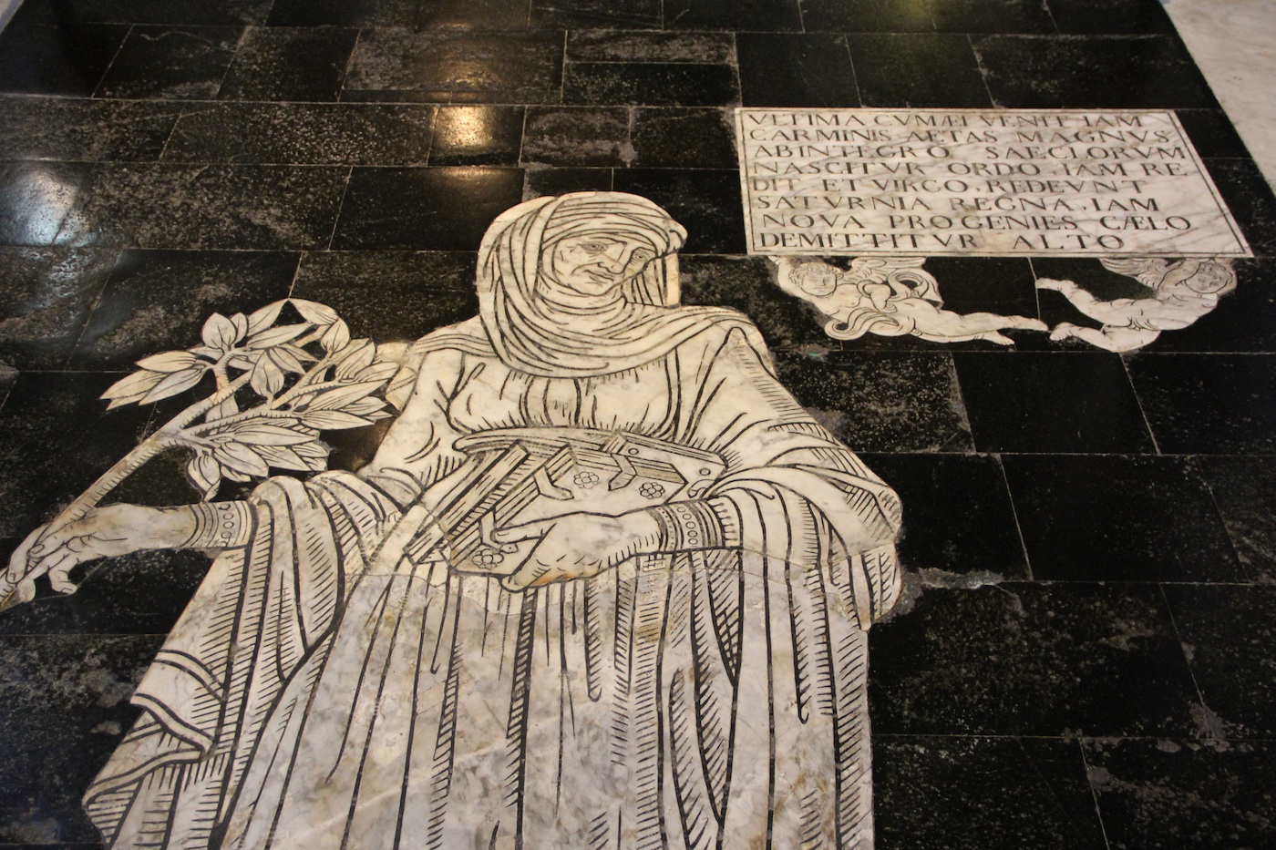 Dessinée par Giovanni di Stefano. Entre 1481-1483